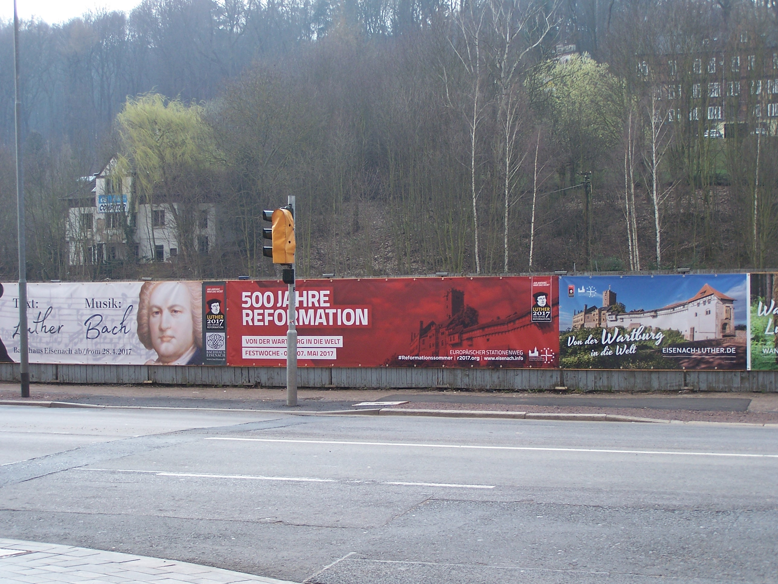 Eisenach, Bahnhofstraße, Werbeaktion der Stadtverwaltung zum 500. Reformationsjubiläum auf dem Bauzaun, der die Baugrube für das Projekt "Tor zur Stadt" umgab.